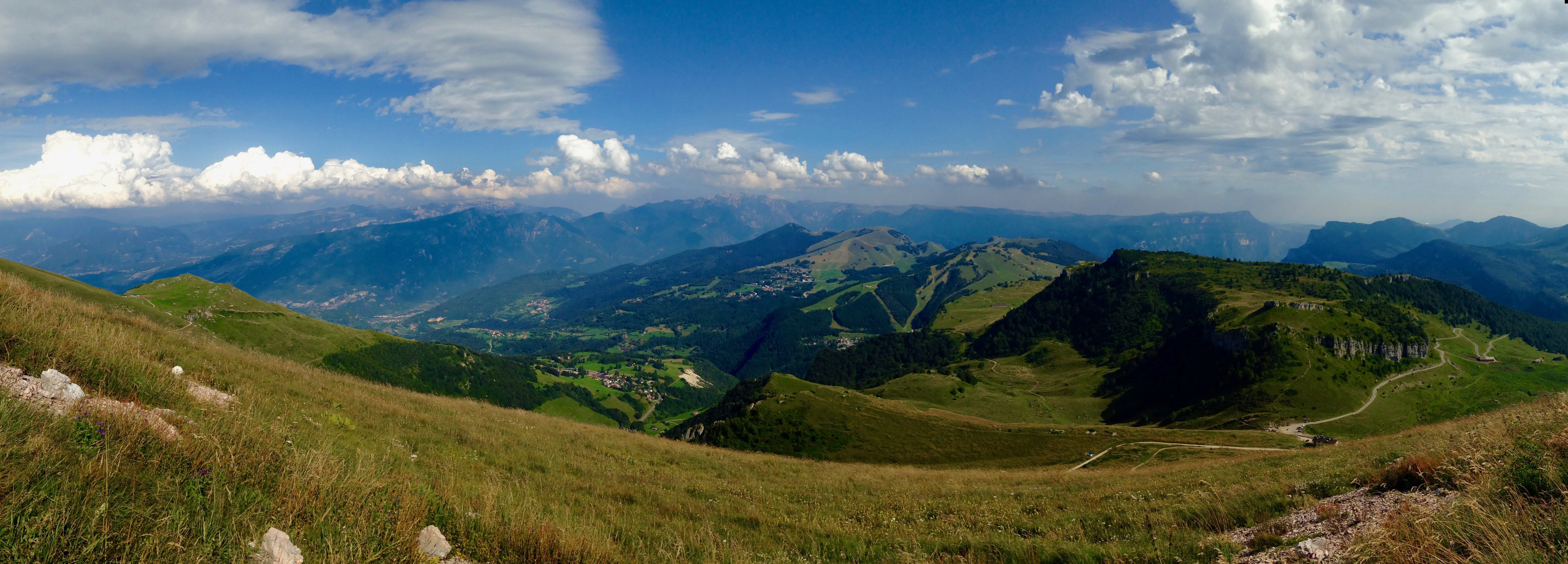 Monte Baldo di Brentonico (Q49967611)